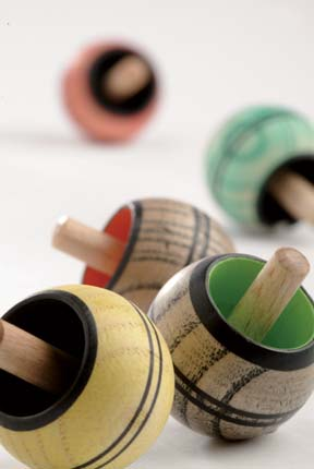 Der »Umdrehkreisel« ist ein physikalischer Sonderkreisel, der sich beim Drehen auf den Kopf stellt.